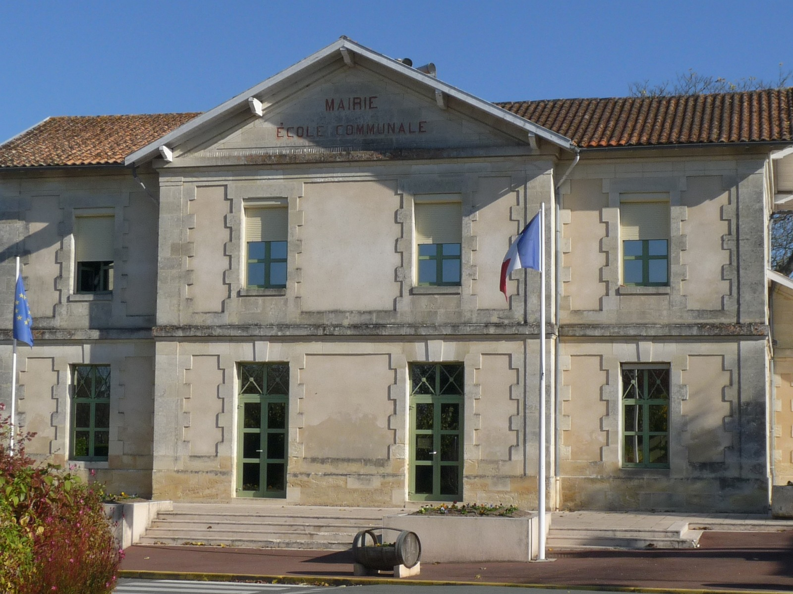 Mairie de Périssac, Gironde, France